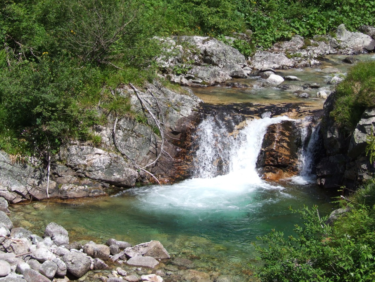 Kaskada na Cichej Wodzie Liptowskiej